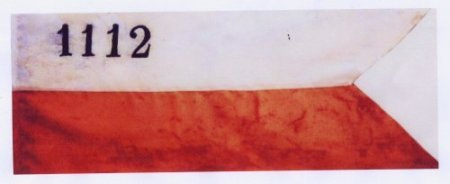 Plik 1